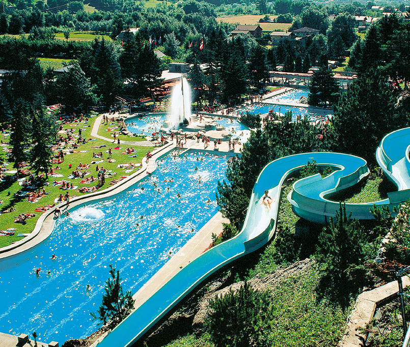 Übersicht Thermalbäder und Rutschbahn